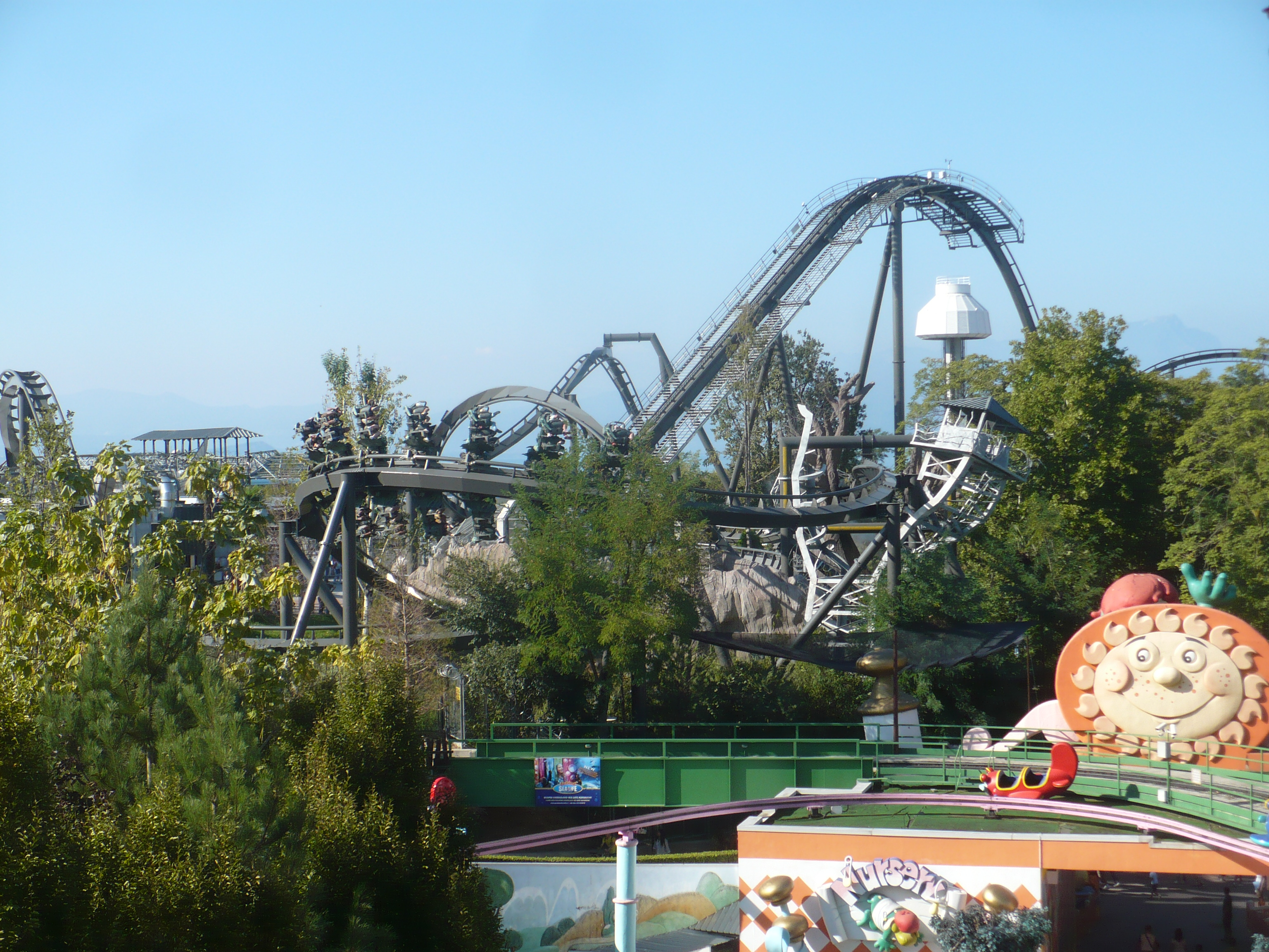 L'attrazione Raptor di Gardaland costruita dalla ditta Svizzera Bolliger & Mabillard.